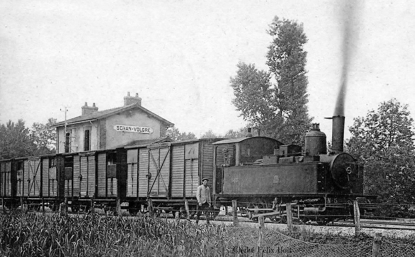 Locomotive Pinguely 030 T en gare de Senan Volgré sur la ligne de Joigny à Toucy